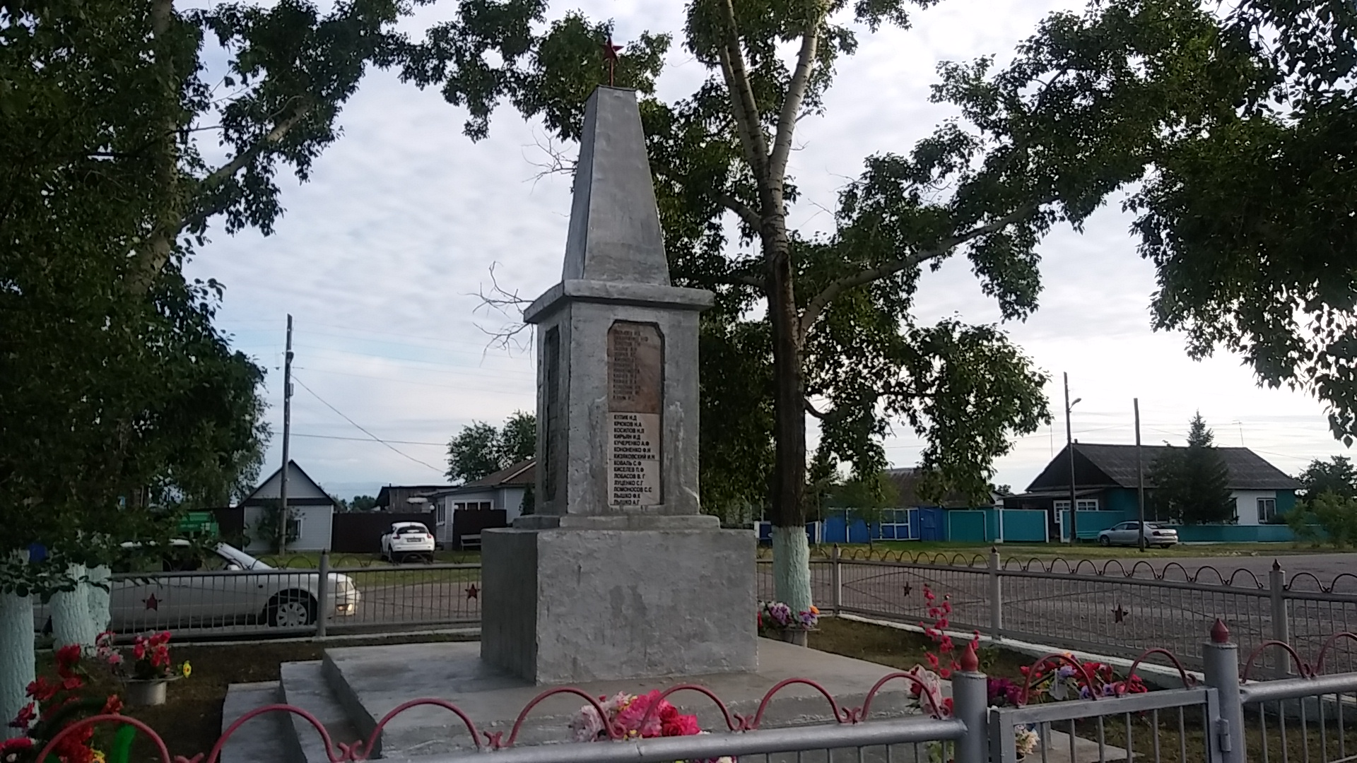 Памятник павшим в годы Великой Отечественной войны: Новомихайловка, Алтайский район, Хакасия